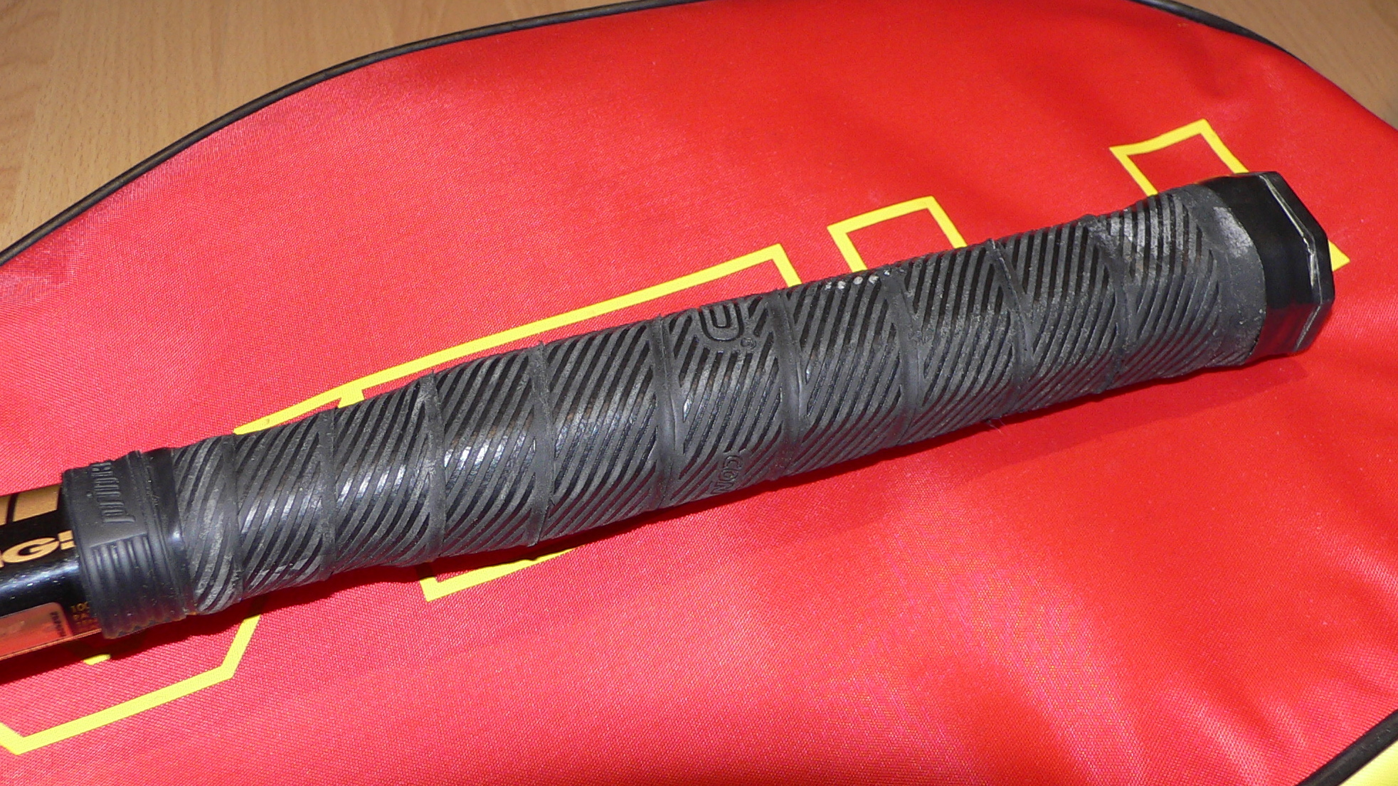 Griffband an einem Tennisschläger, schon leicht abgenutzt Benutzer:SuperFLoh/Vorlagen/BildInfo |CAM= :de:Panasonic|Panasonic :de:Lumix|Lumix DMC-FZ3 |SHUTTER=1/60s |BLENDE=f 2.8 |DATE=23.05.2005